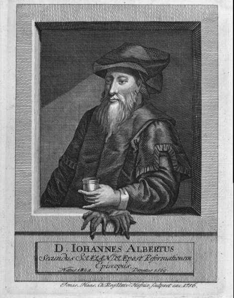 Hans Albertsen, 1525-1569, biskop over Sjælland fra 1560 til sin død. Kobberstikk av Jonas Haas